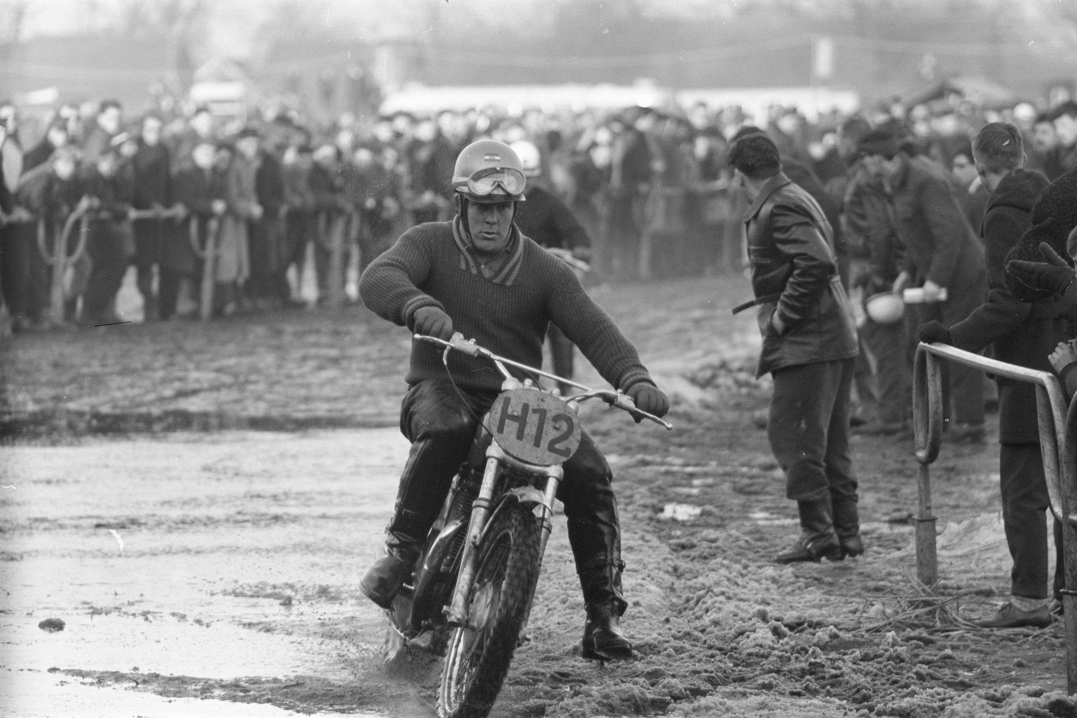 Collectie / Archief : Fotocollectie Anefo Reportage / Serie : [ onbekend ] Beschrijving : Internationale motorterreinwedstrijden tussen Belgie en Nederland te Gemert (NB). Broer Dirkx tijdens de laatst manche Datum : 3 maart 1963 Locatie : België, Gemert, Nederland Trefwoorden : motoren, terreinwedstrijden Fotograaf : Pot, Harry / Anefo Auteursrechthebbende : Nationaal Archief Materiaalsoort : Negatief (zwart/wit) Nummer archiefinventaris : bekijk toegang 2.24.01.05 Bestanddeelnummer : 914-8861